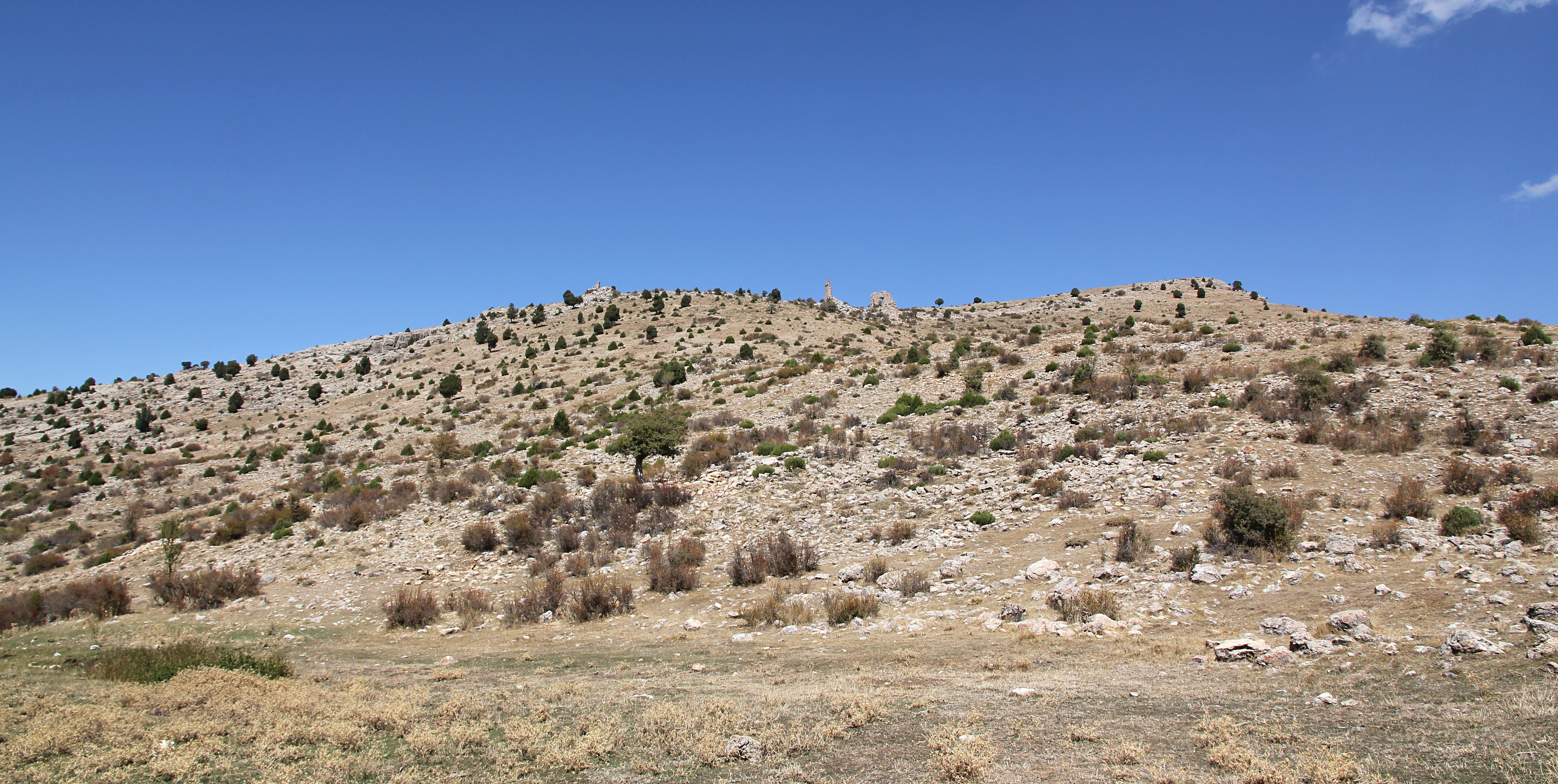 Isaura, antike Stadt bei Bozkır in der türkischen Provinz Konya, Akropolishügel